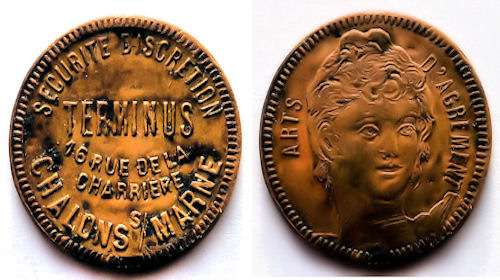 Jeton « TERMINUS - Arts d'agrément » 16 RUE DE LA CHARRIERE à Challons sur Marne.